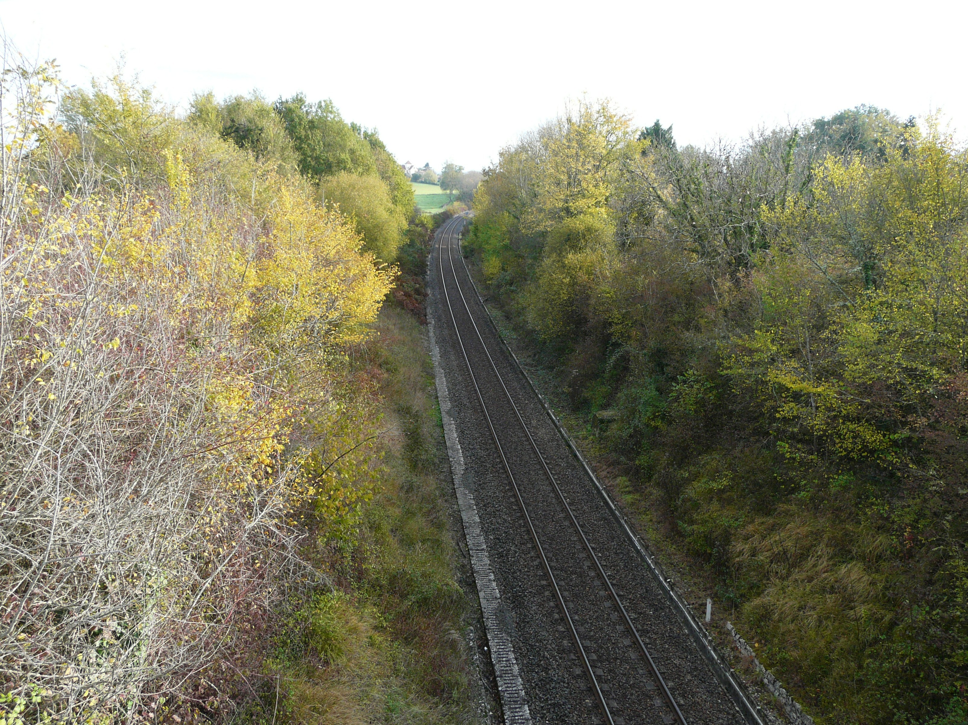 Ligne ferroviaire en direction de Brive, au sud du village de Limeyrat, Dordogne, France.